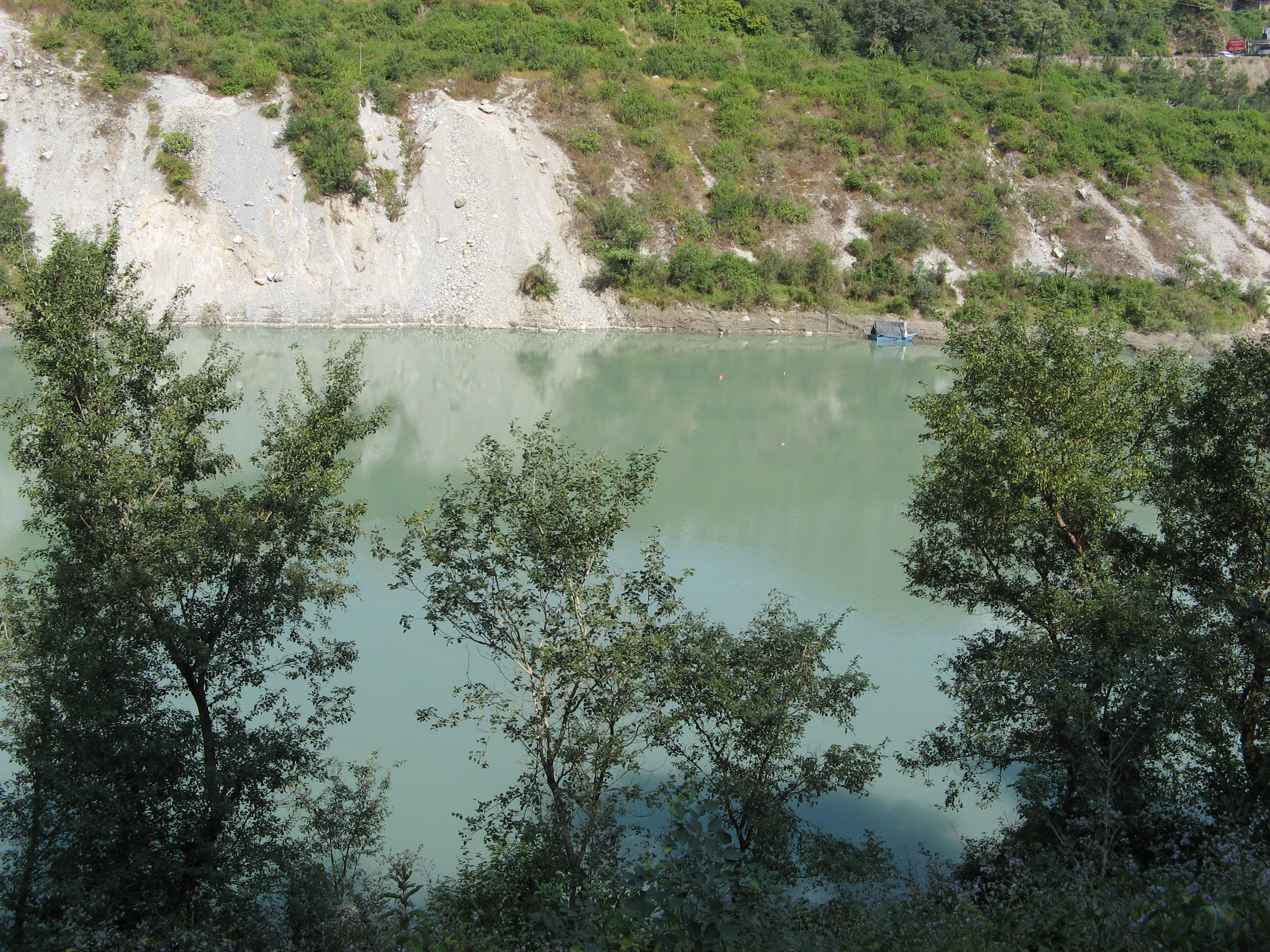 DEEP KUMAR SHARMA